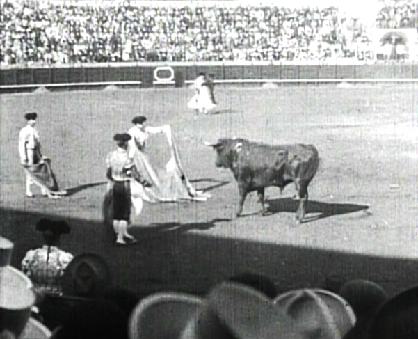 Film Lumière, réalisé le 7 mars 1897 à Barcelone, par Francis Doublier, à 9 images par seconde (premier accéléré du cinéma).